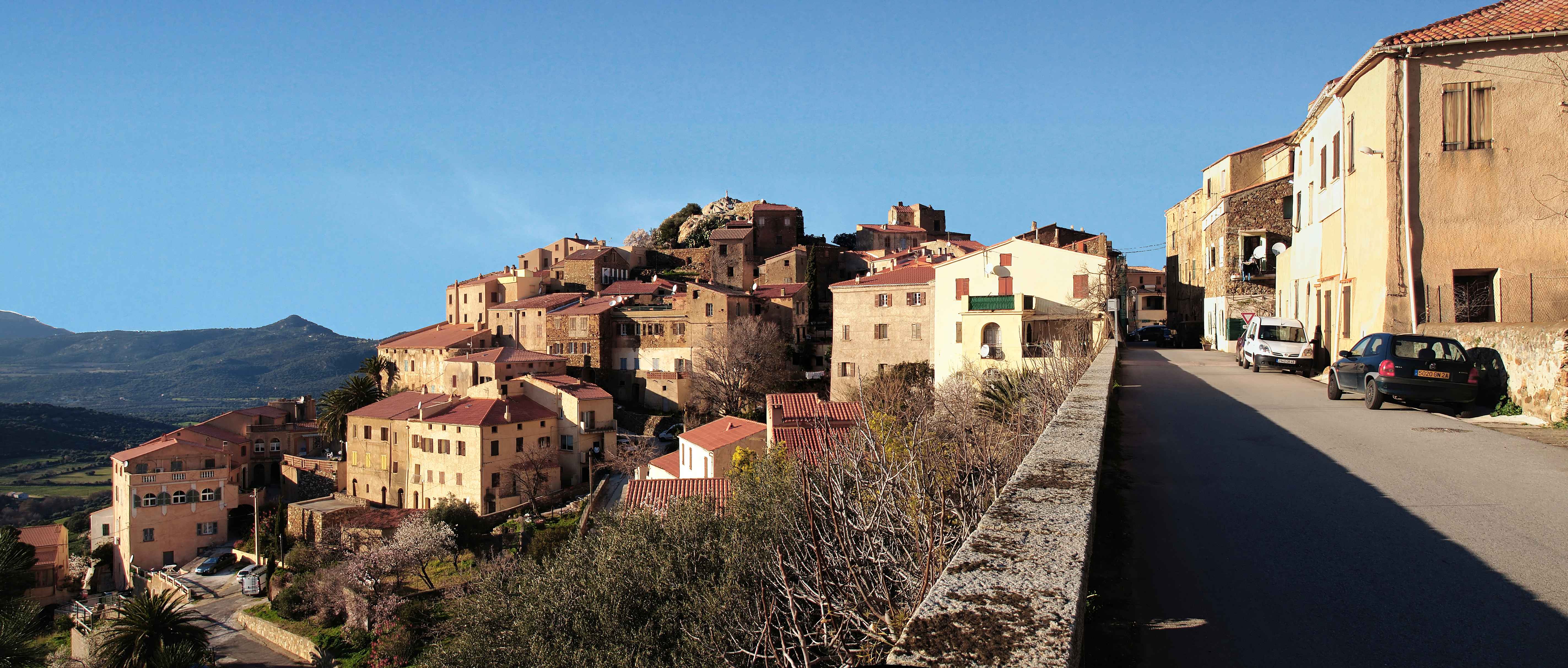 Belgodère - Le village vu depuis la RD 71